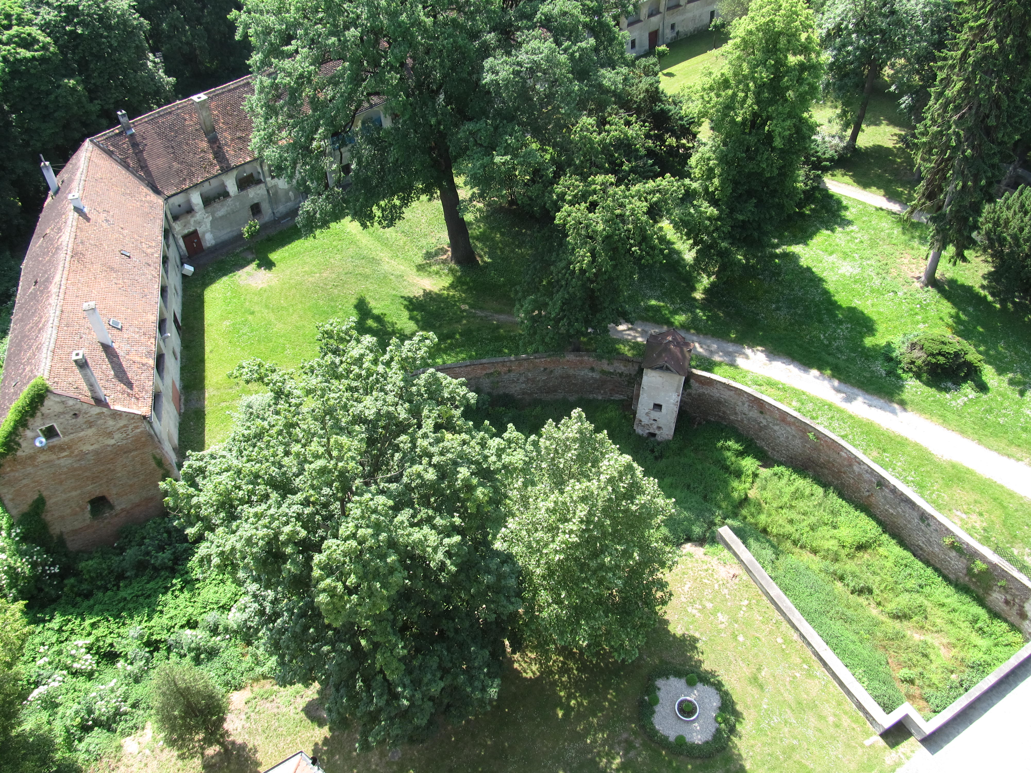 Tovačov předzámčí